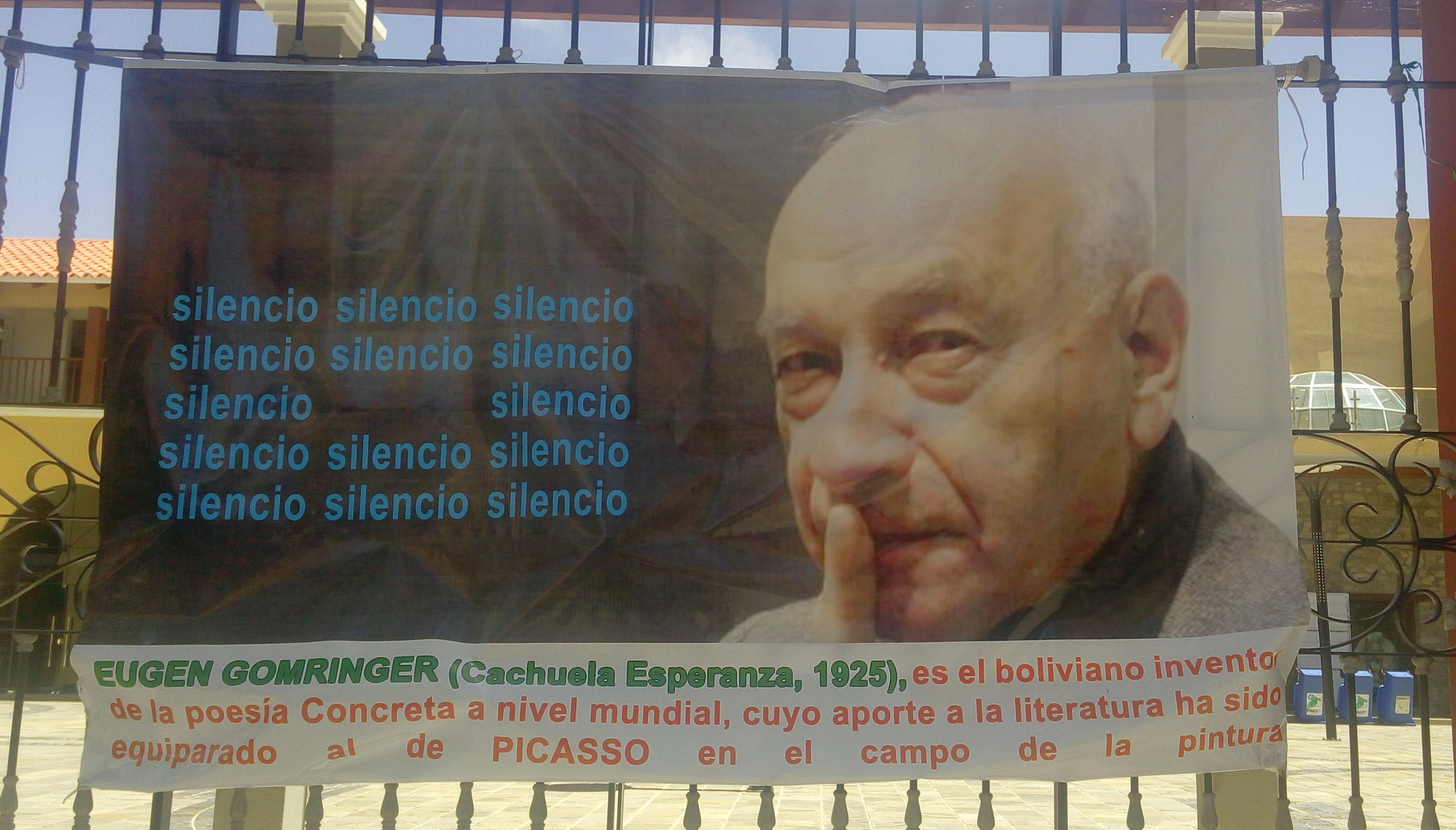 Plakat, das Eugen Gomringer als Bolivianer und Begründer der Konkreten Poesie preist, inkl. dem Gedicht "Silencio"